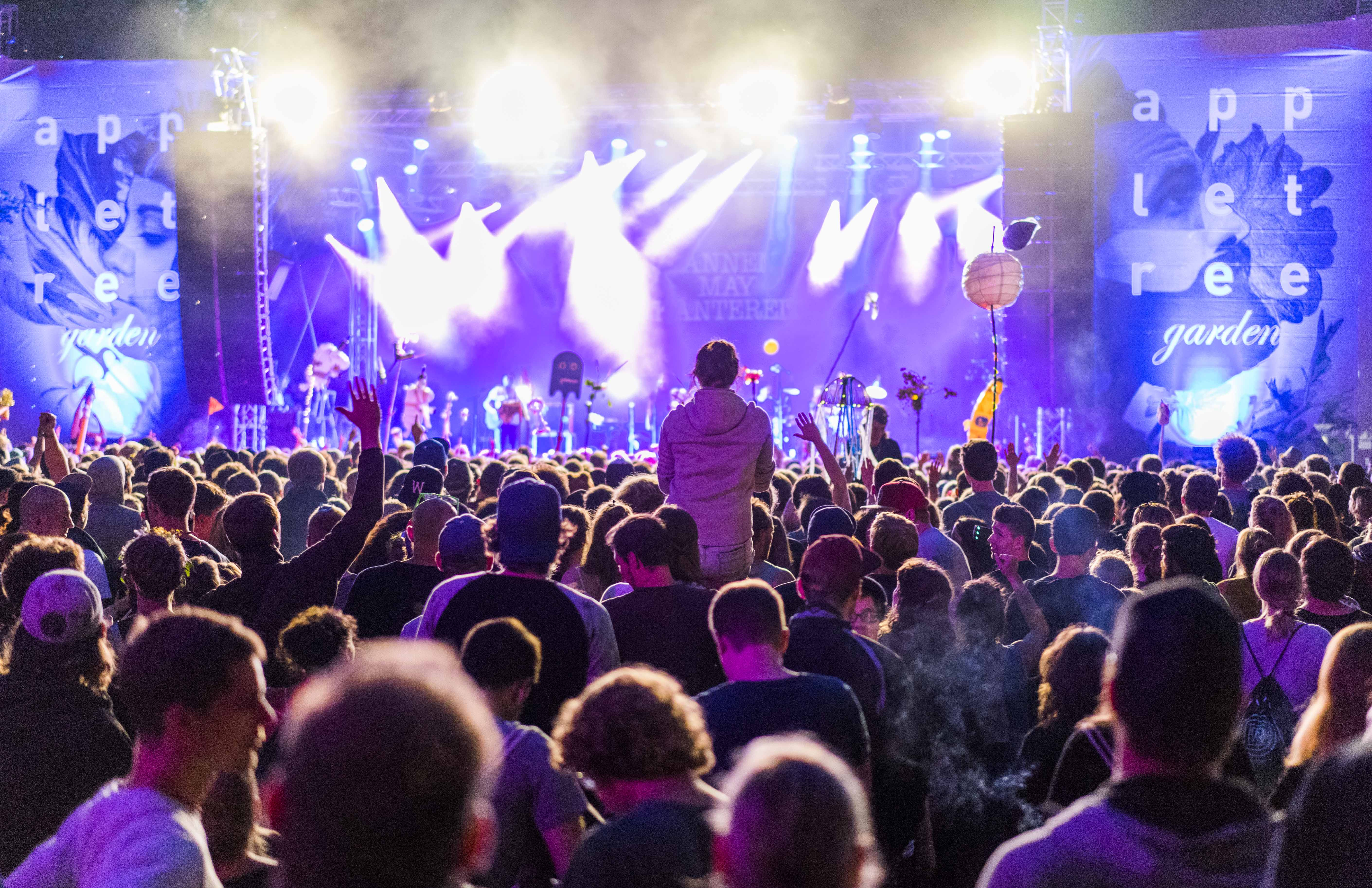 Appletree Garden 2016 Bühne